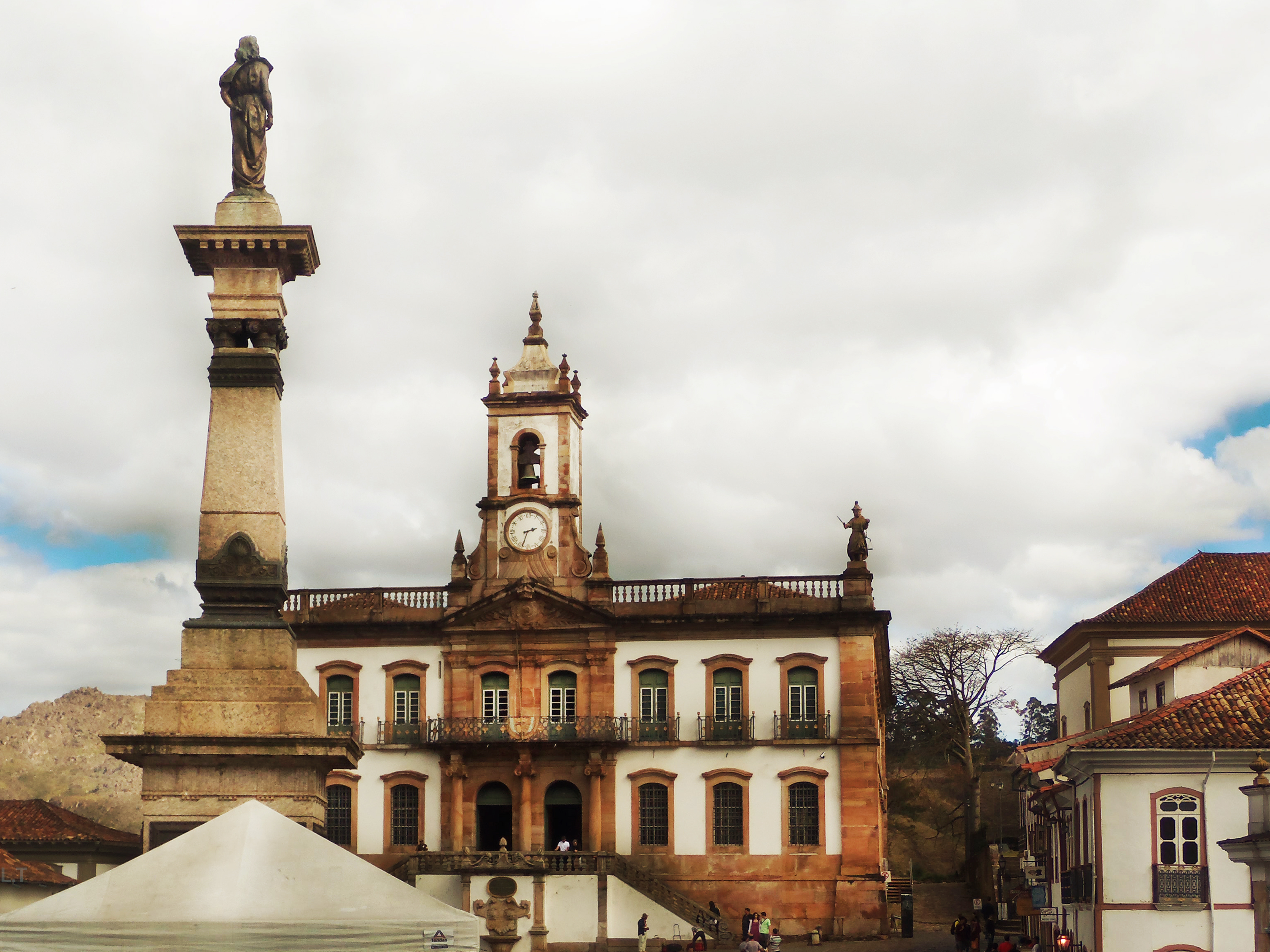 Passo à Praça Tiradentes